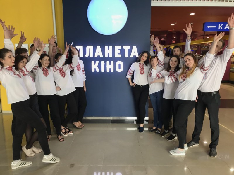 День вишиванки у Планета Кіно